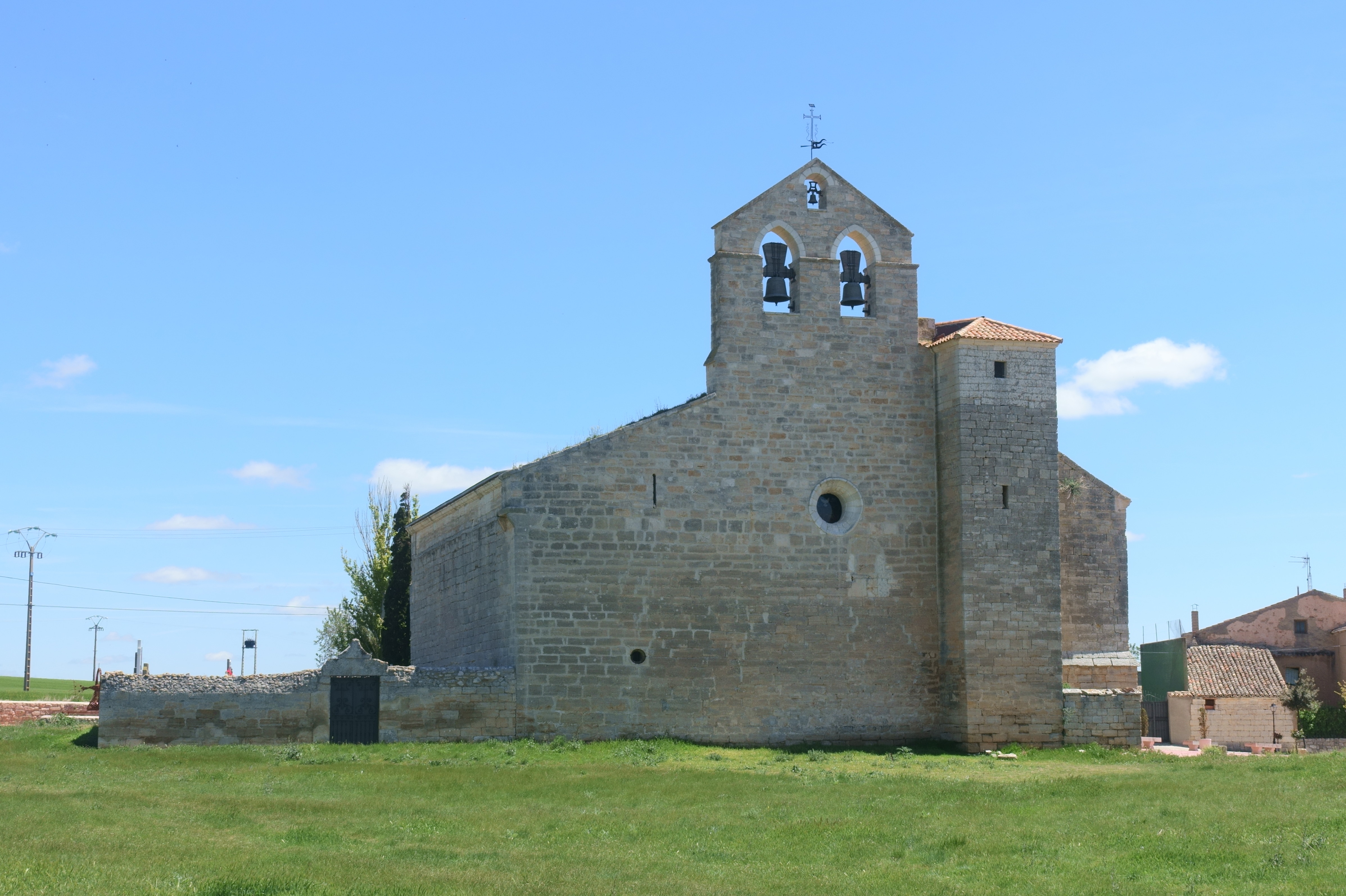 Iglesia de San Juan Bautista, Palazuelos de Muñó (Burgos, España).